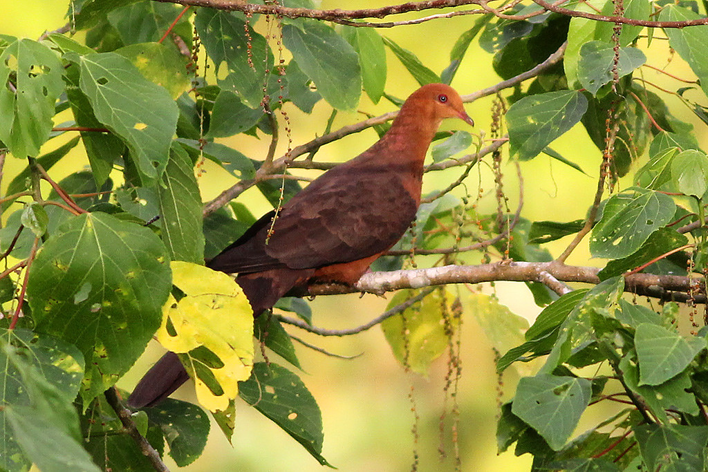 Philippine Cuckoo-Dove (Macropygia tenuirostris), Bangkong Kahoy valley, Luzon, Philippines